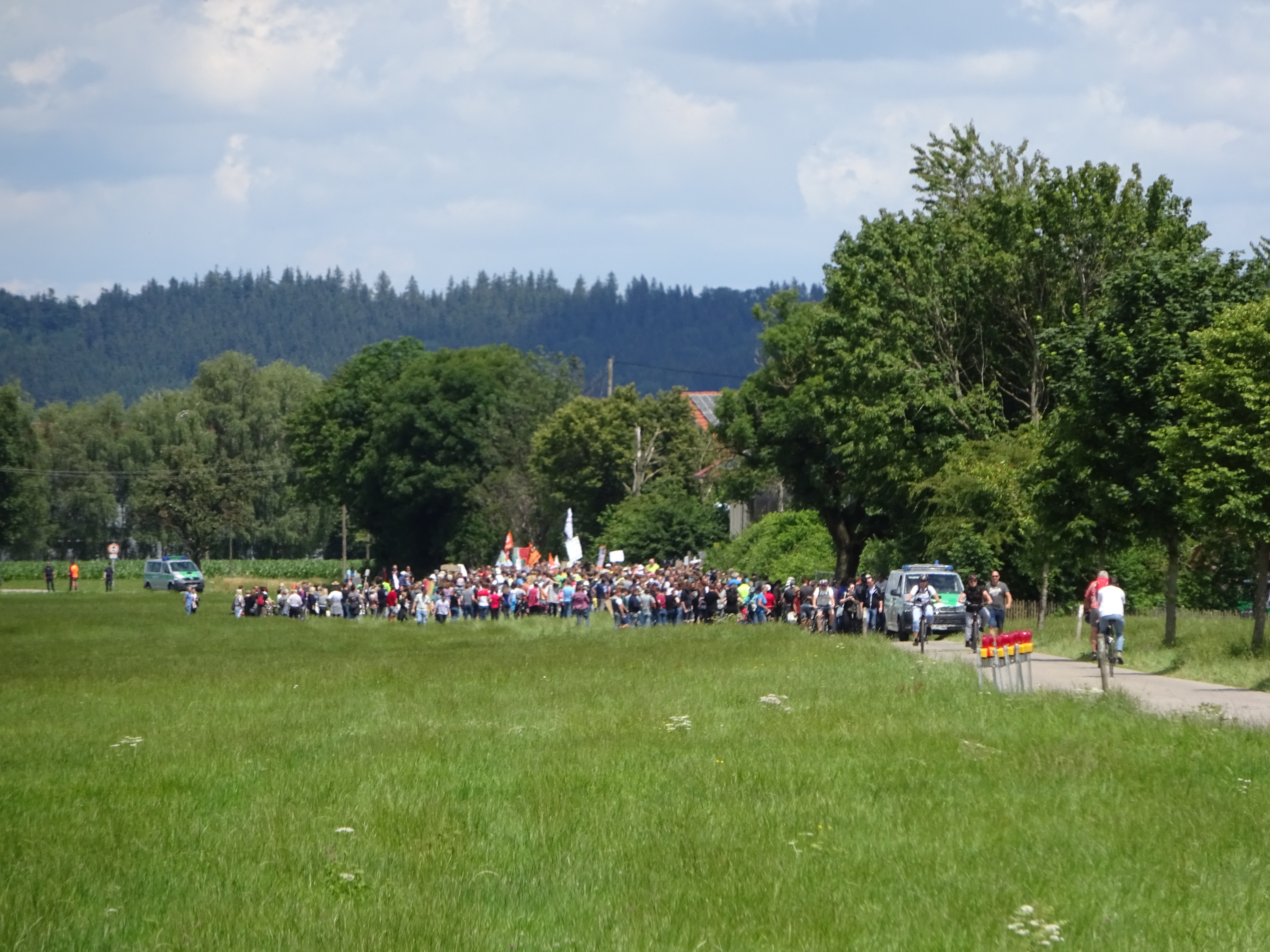 Demonstration der V3-Partei in Bad Grönenbach "Milchqualbetrieb schließen!" am 14. Juli 2019, Landkreis Unterallgäu, Bayern